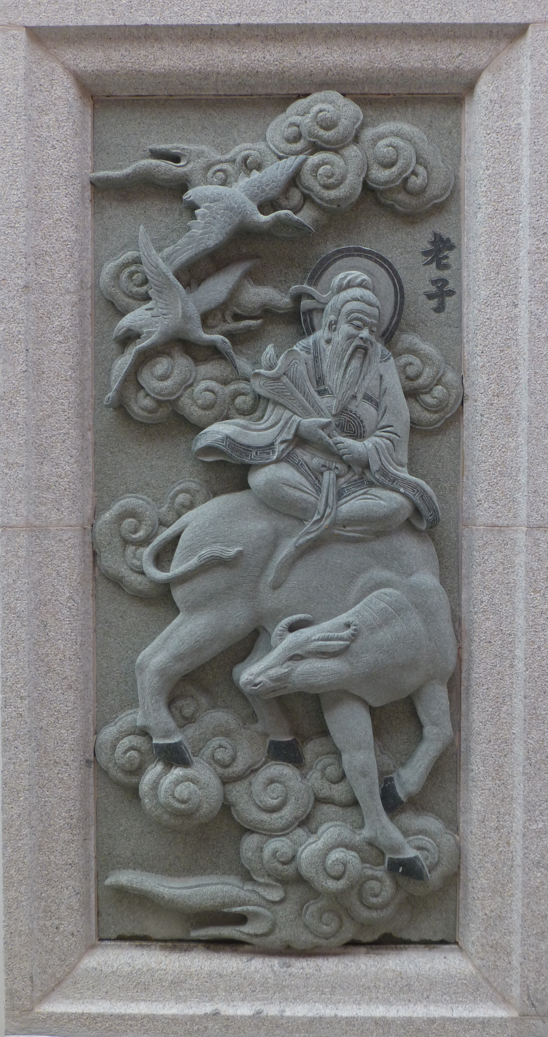 016 Lao zi, Investiture of the Gods at Ping Sien Si, Pasir Panjang, Perak, Malaysia Photograph from the Ping Sien Si Temple in Perak, Malaysia taken by Anandajoti.